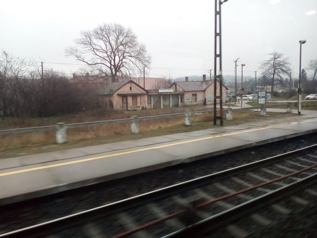 Vértesszőlős (Vértesszőlős-Remeteség) megállóhely